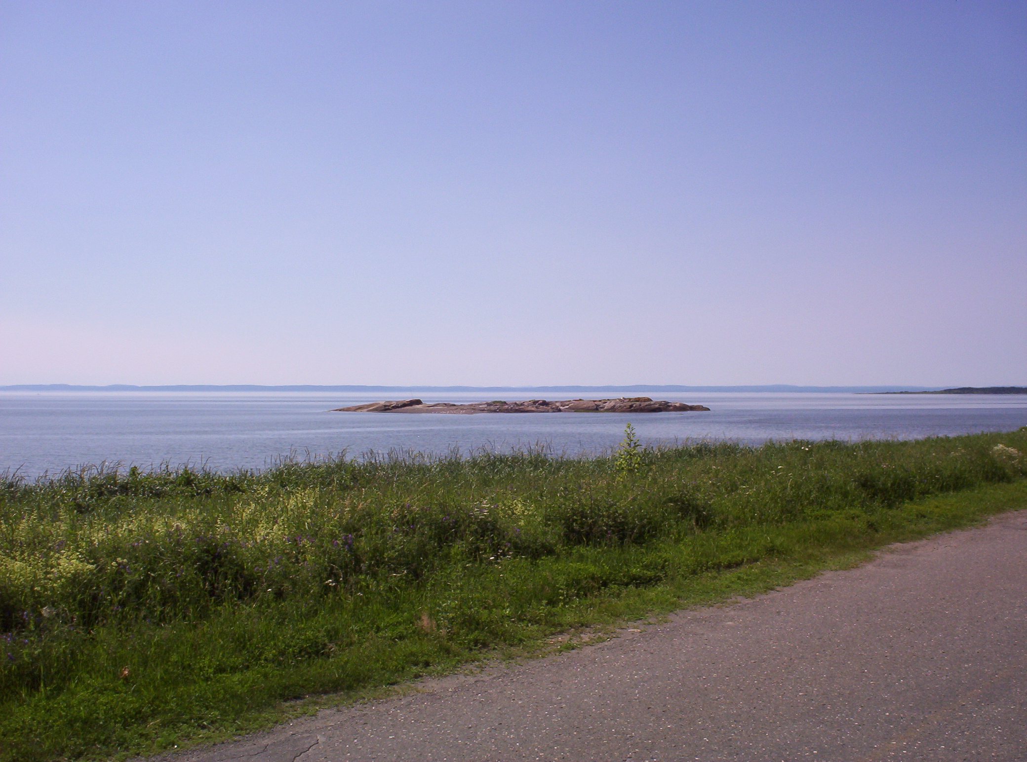 Vue du fleuve Saint-Laurent depuis la ville de Trois-Pistoles au Québec